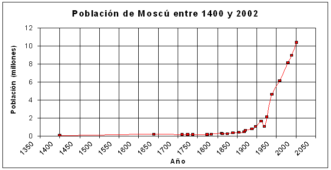 Población de Moscú entre (1400-2002). De acuerdo con los datos facilitados en la propia página.